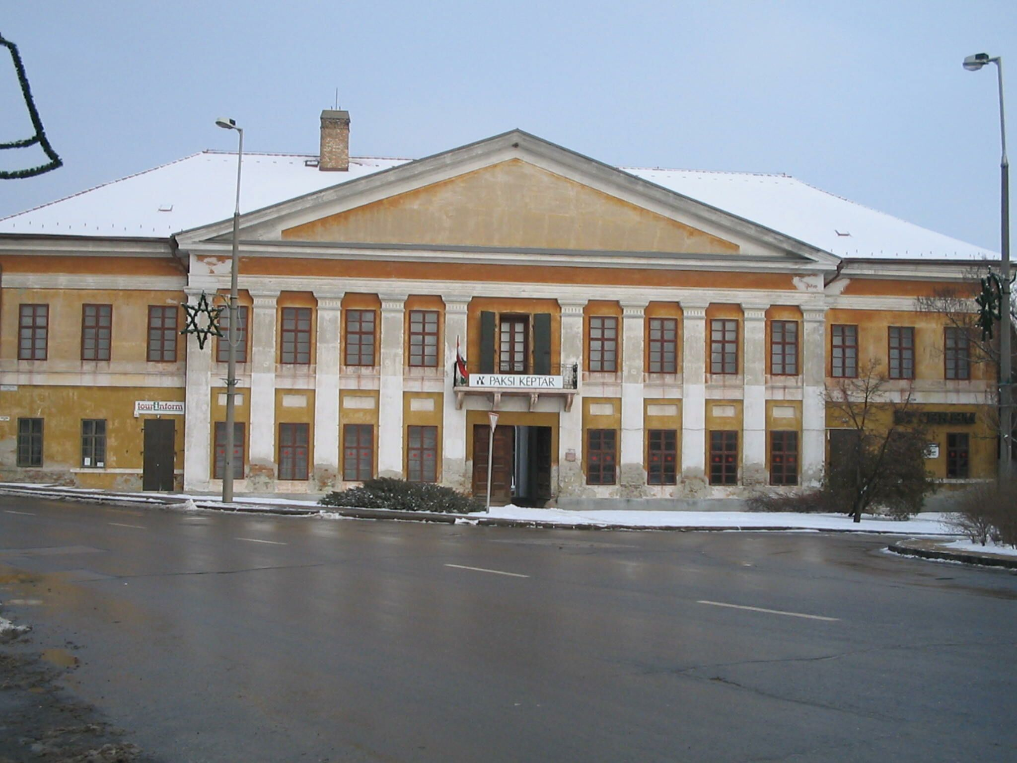 A paksi Erzsébet szálló a felújítás előtt